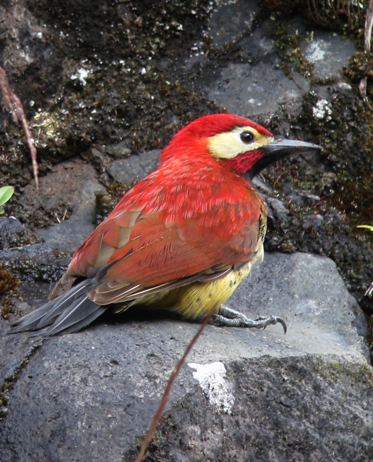 Manizales, Caldas, Colombia